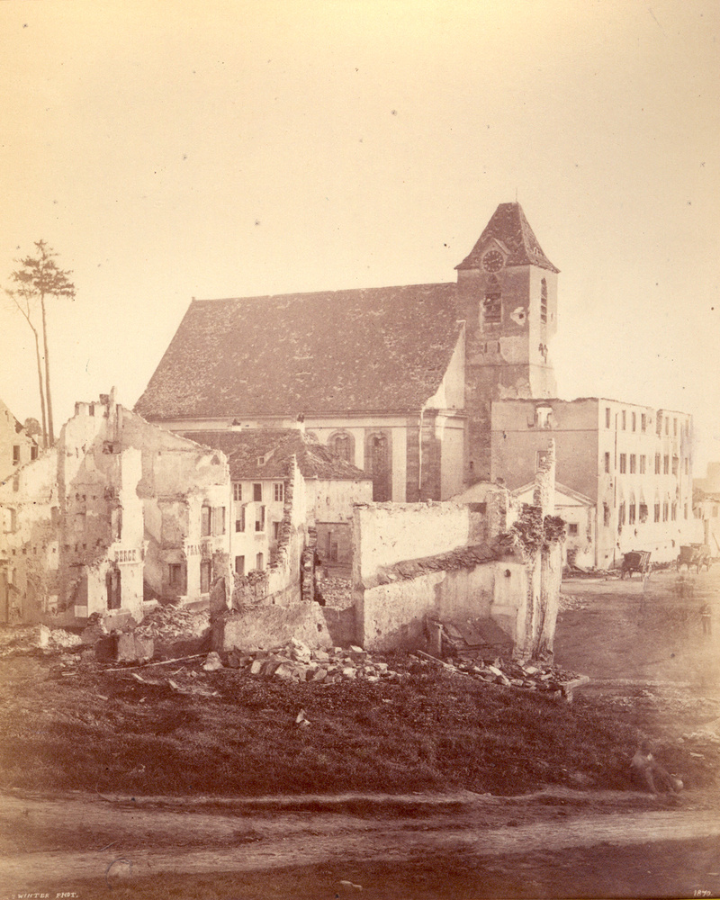 Photographie sur papier albuminé 22,9 x 18,7 cm